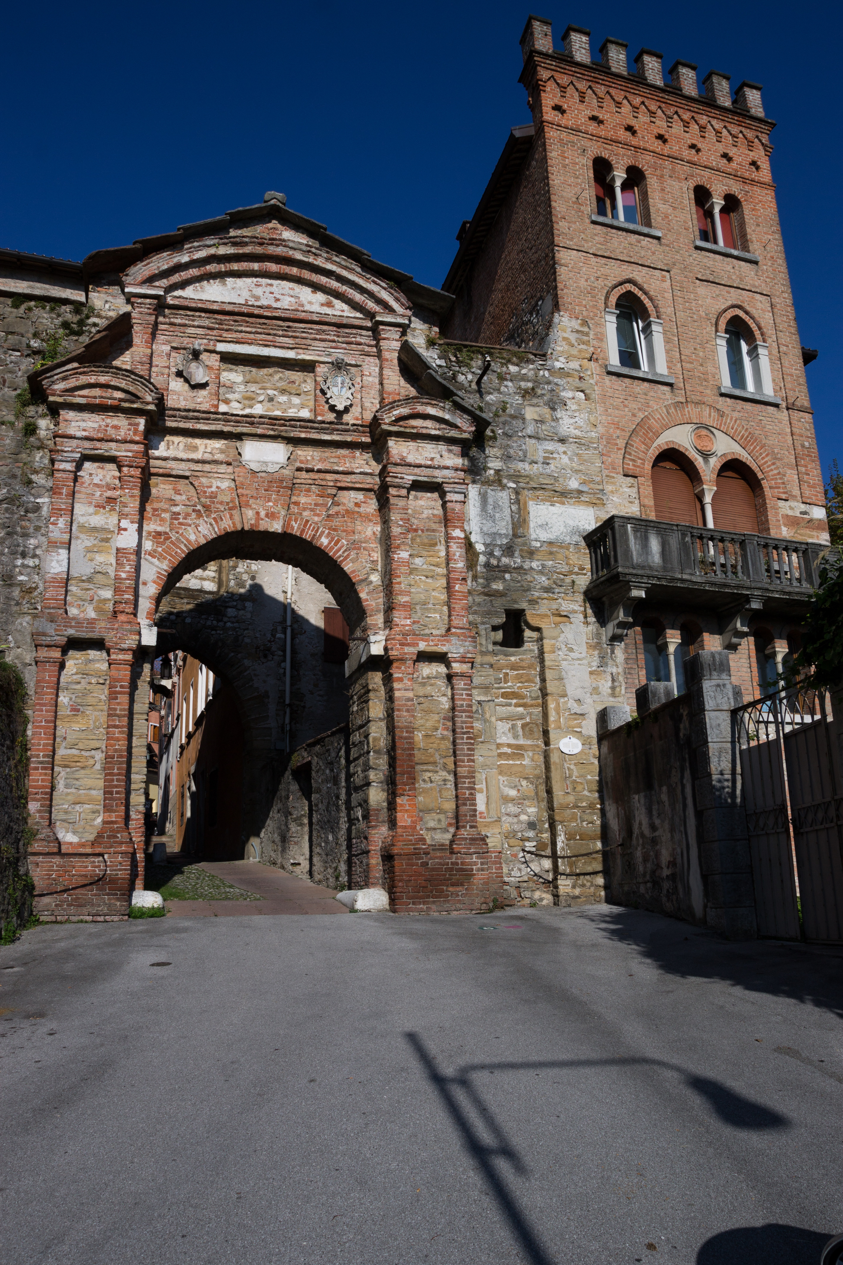 Porta Rugo ID05A7570008 This is a photo of a monument which is part of cultural heritage of Italy.